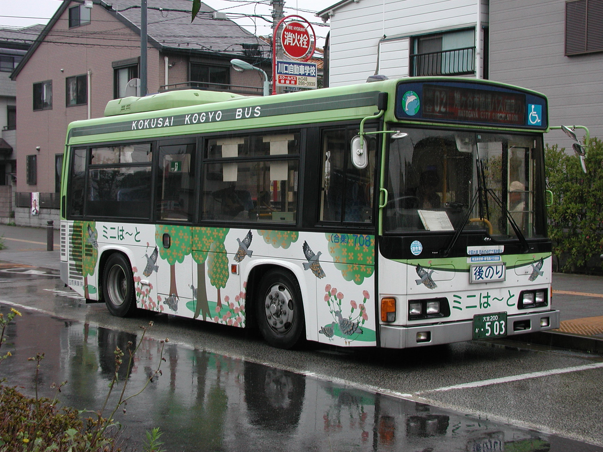 「鳩ヶ谷市循環バス『ミニは〜と』」専用車両（日野・レインボーHR：KK-HR1JEEE/国際興業鳩ヶ谷営業所所属：社番・708） 鳩ヶ谷駅東口にて